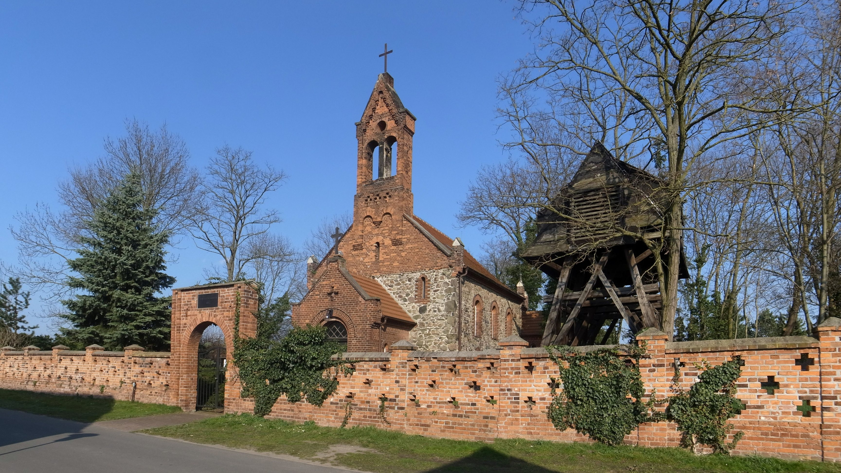 Möhlau, Kirche und Glockenstuhl